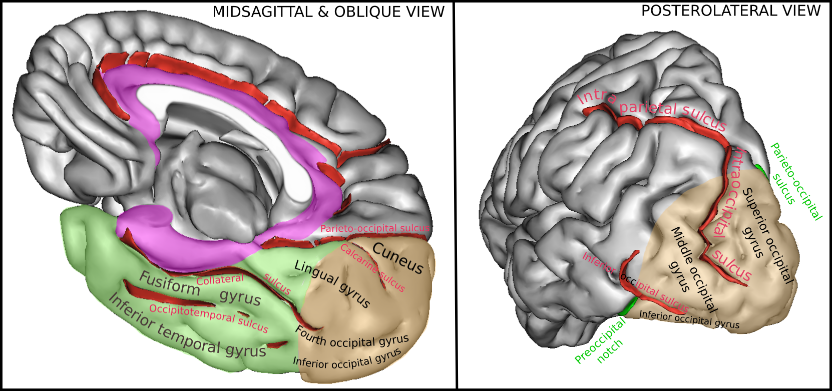 Ænglisc: Occipital brain lobe, sulci an gyri